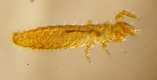 Protura specimen, taken under stereo microscope (40x). Acerentomon sp.